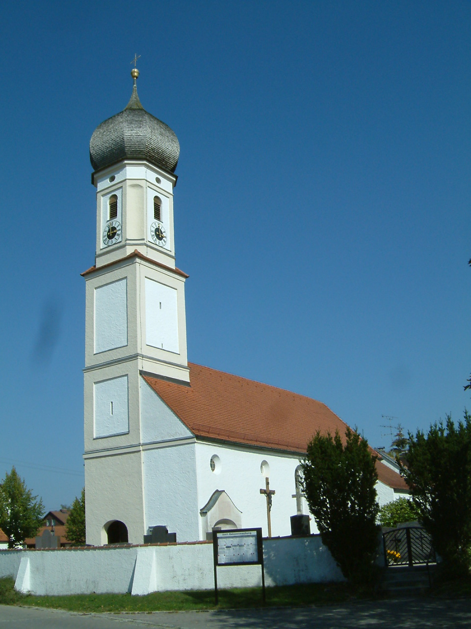 Kirche Hl. Margarete in Mintraching bei Freising, nicht zu verwechseln mit Mintraching bei Regensburg